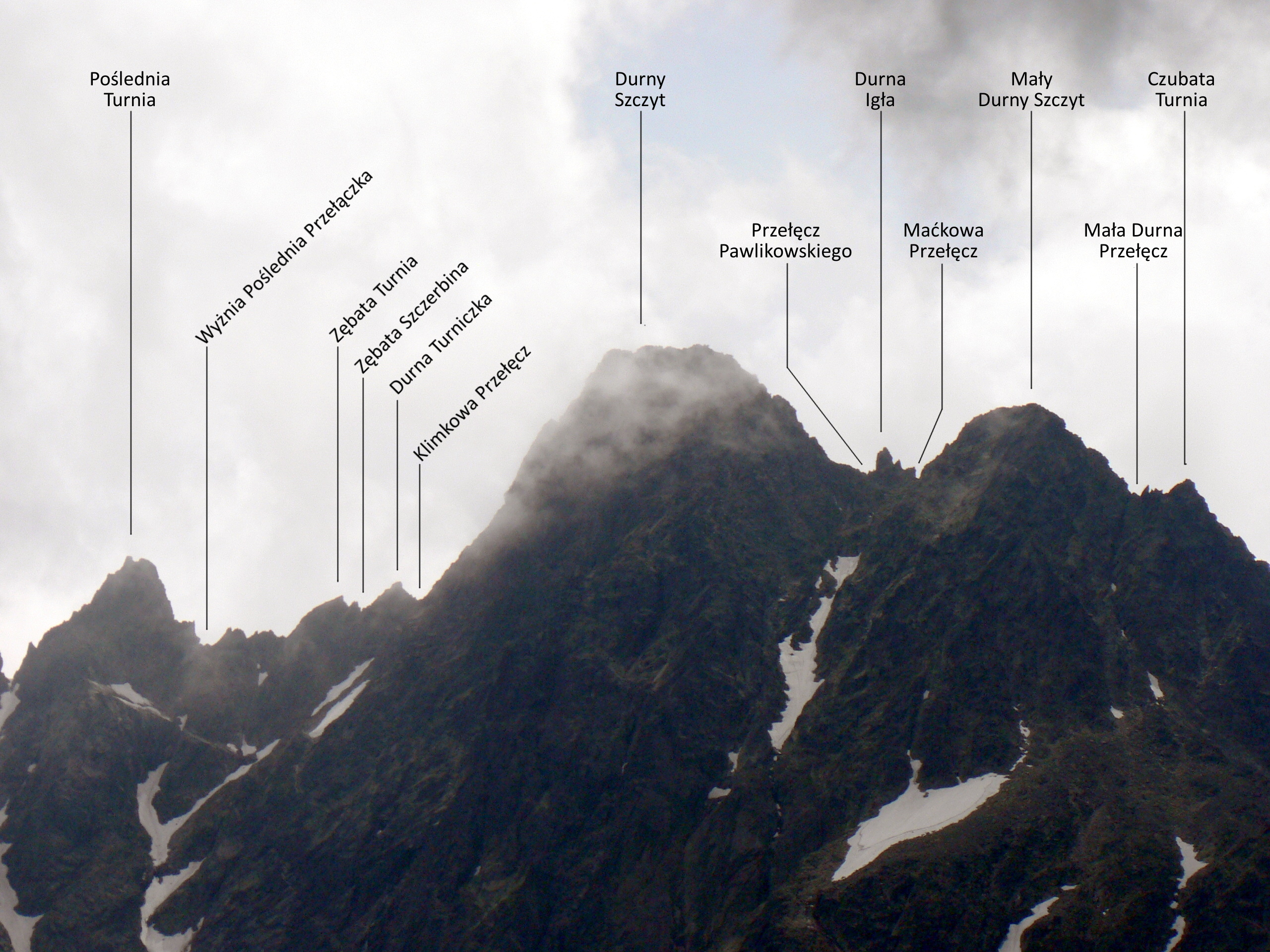 Durny i Mały Durny Szczyt znad Wielkiego Białego Stawu